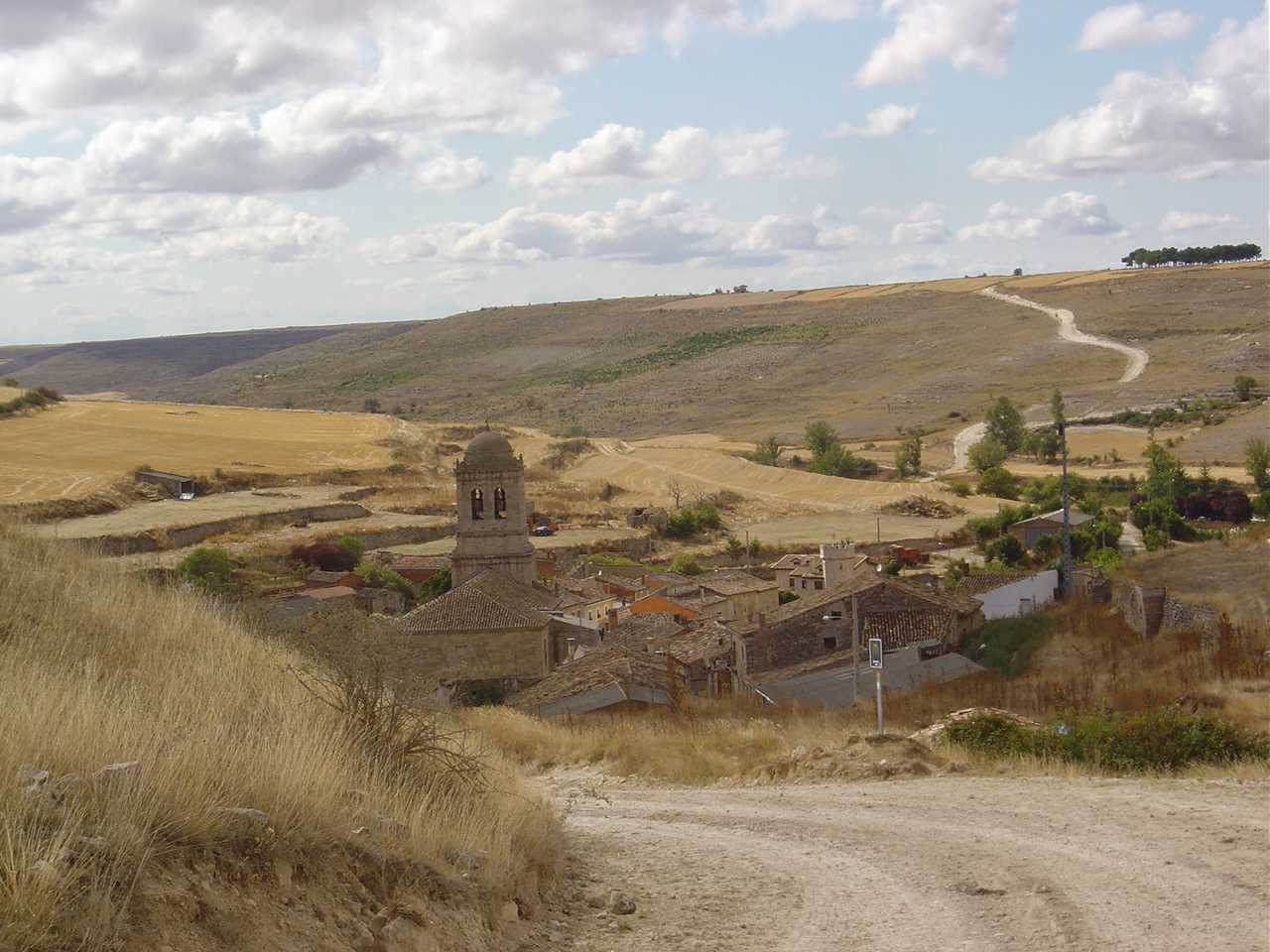 entrada de hontanas desde la meseta